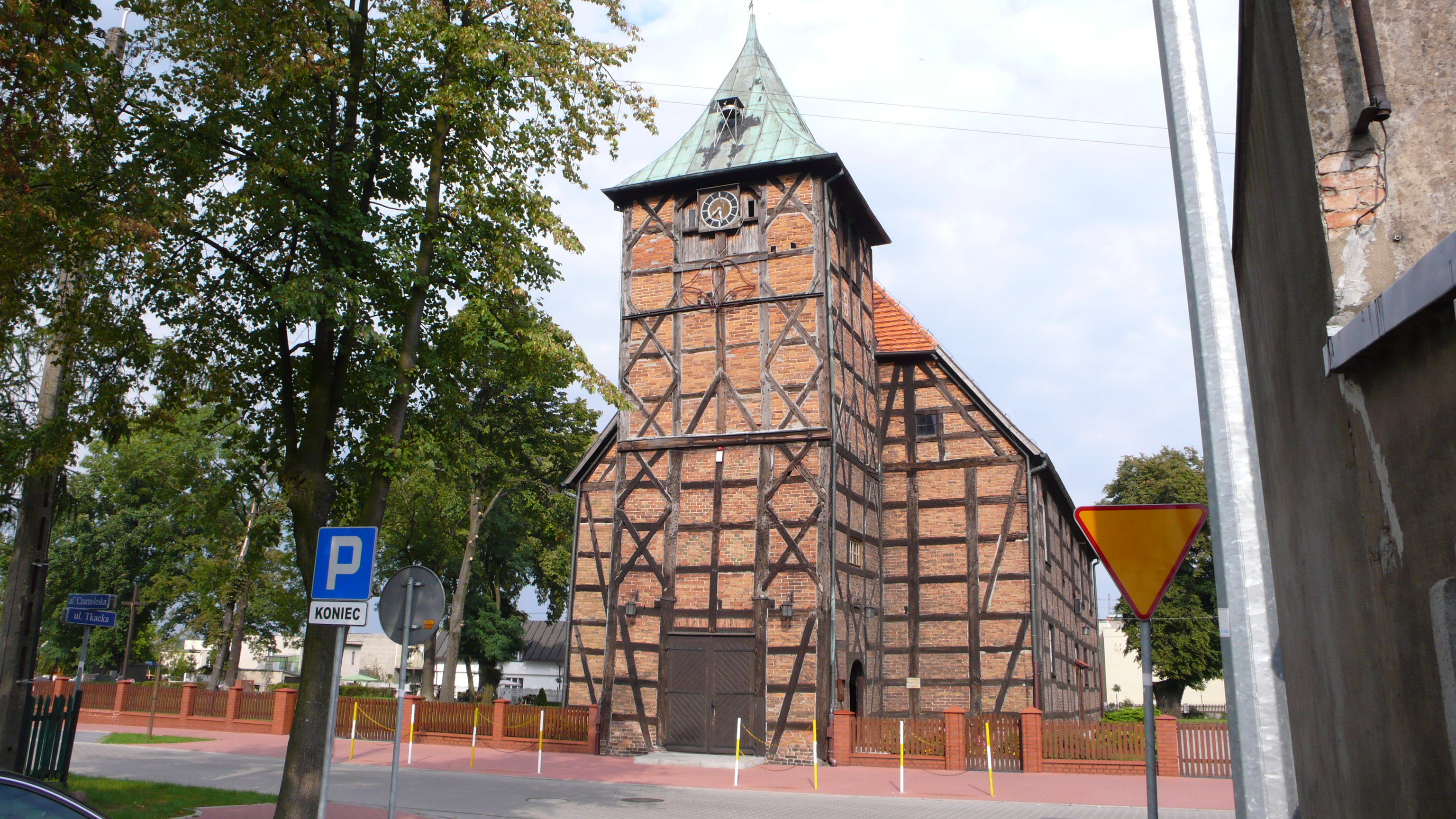 Kościół w Zaborowie fot. 1